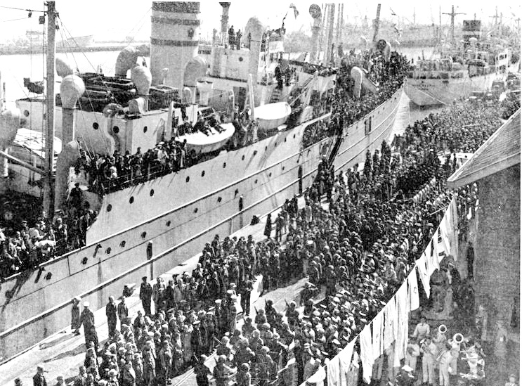 משוחררי מחנות המעצר בקפריסין מתקבלים בנמל חיפה 1948